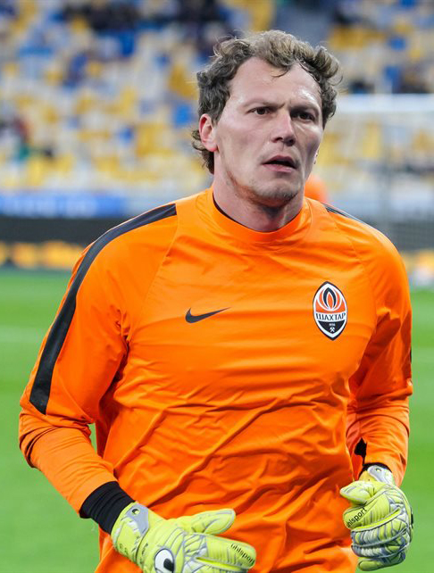 Динамо - Шахтер 0:1